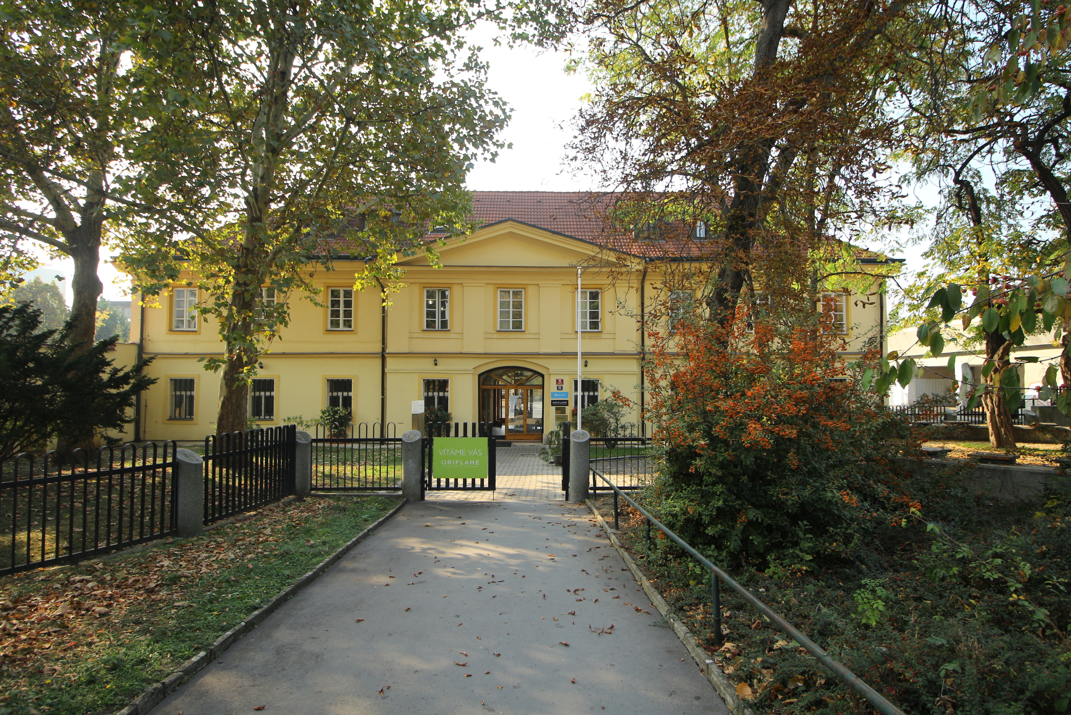 Praha 10-Strašnice, Bečvářův dvůr, sídlo společnosti Oriflame